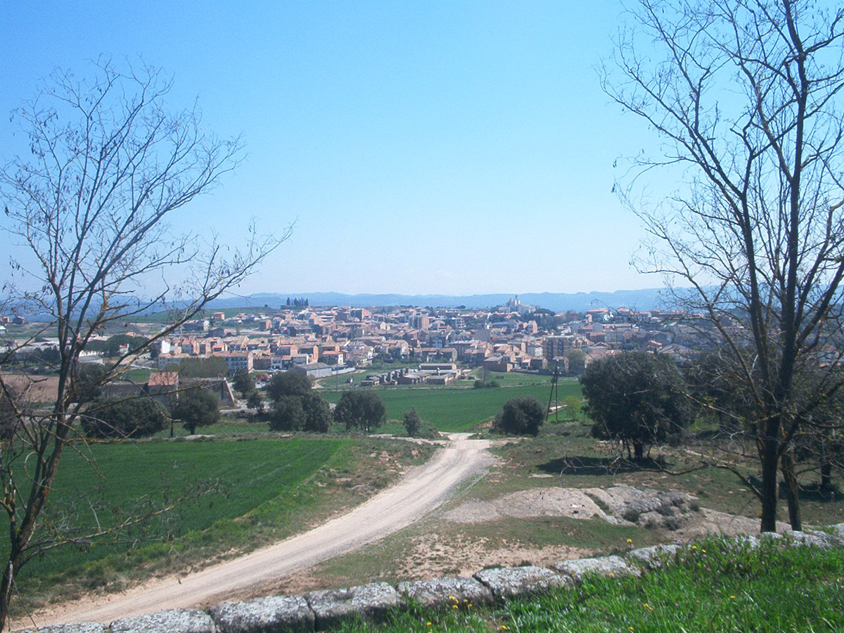 Prats de Lluçanès des de Sant Sebastià